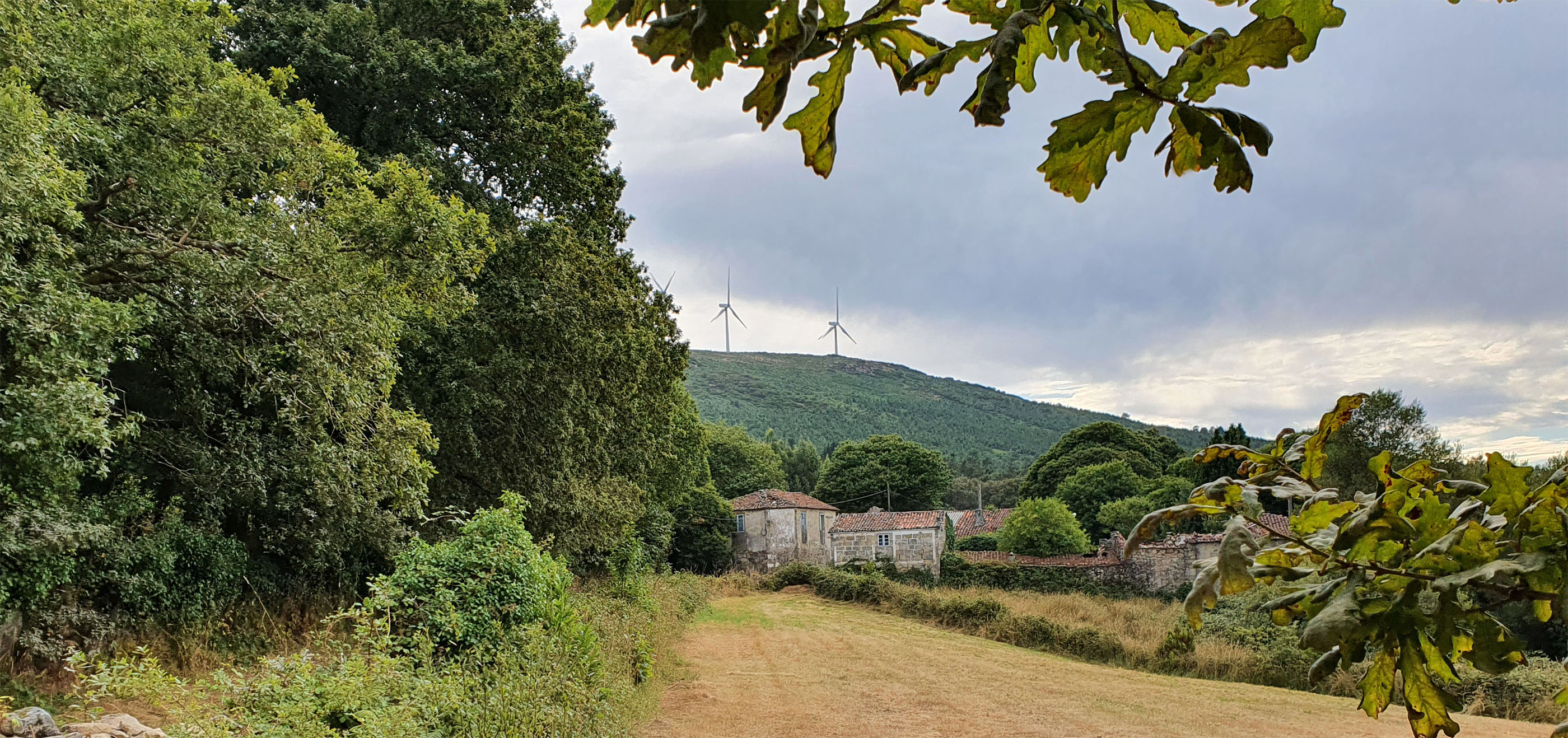 Lugar de San Tomé, na parroquia de San Martiño de Amarante (tamén coñecida como San Martiño do Carrasco), no Concello de Antas de Ulla (Lugo)